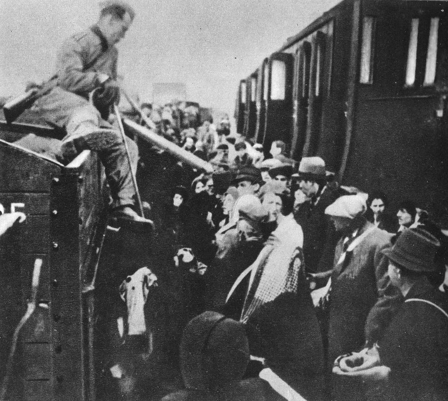 Przeładunek Żydów do wagonów kolejki wąskotorowej do Chełmna